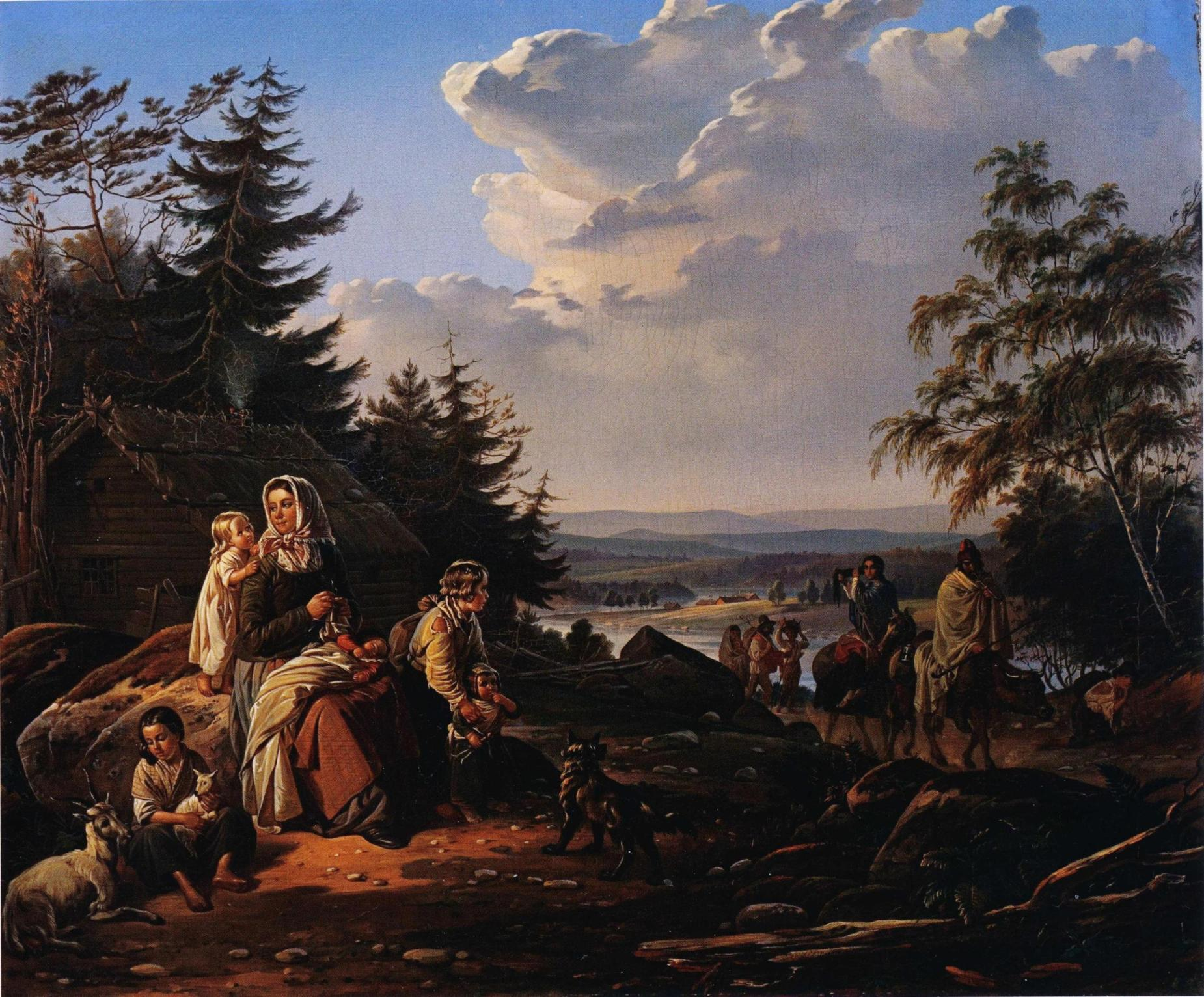 R. W. Ekmanin maalaus, kuuluu Fortumin Taidesäätiön kokoelmiin.